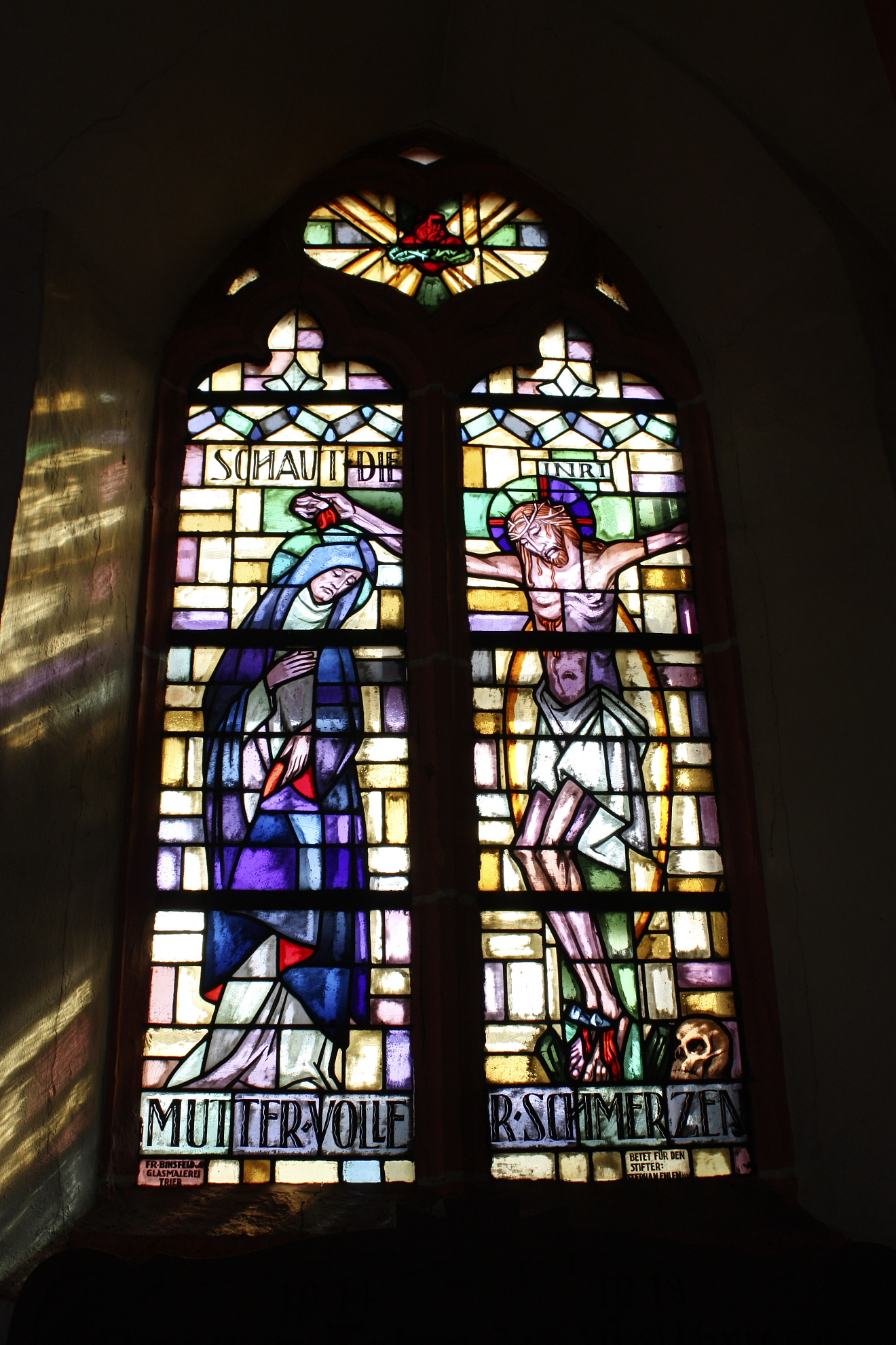 Fenster in der ehemaligen Pfarrkirche Lösnich 2011